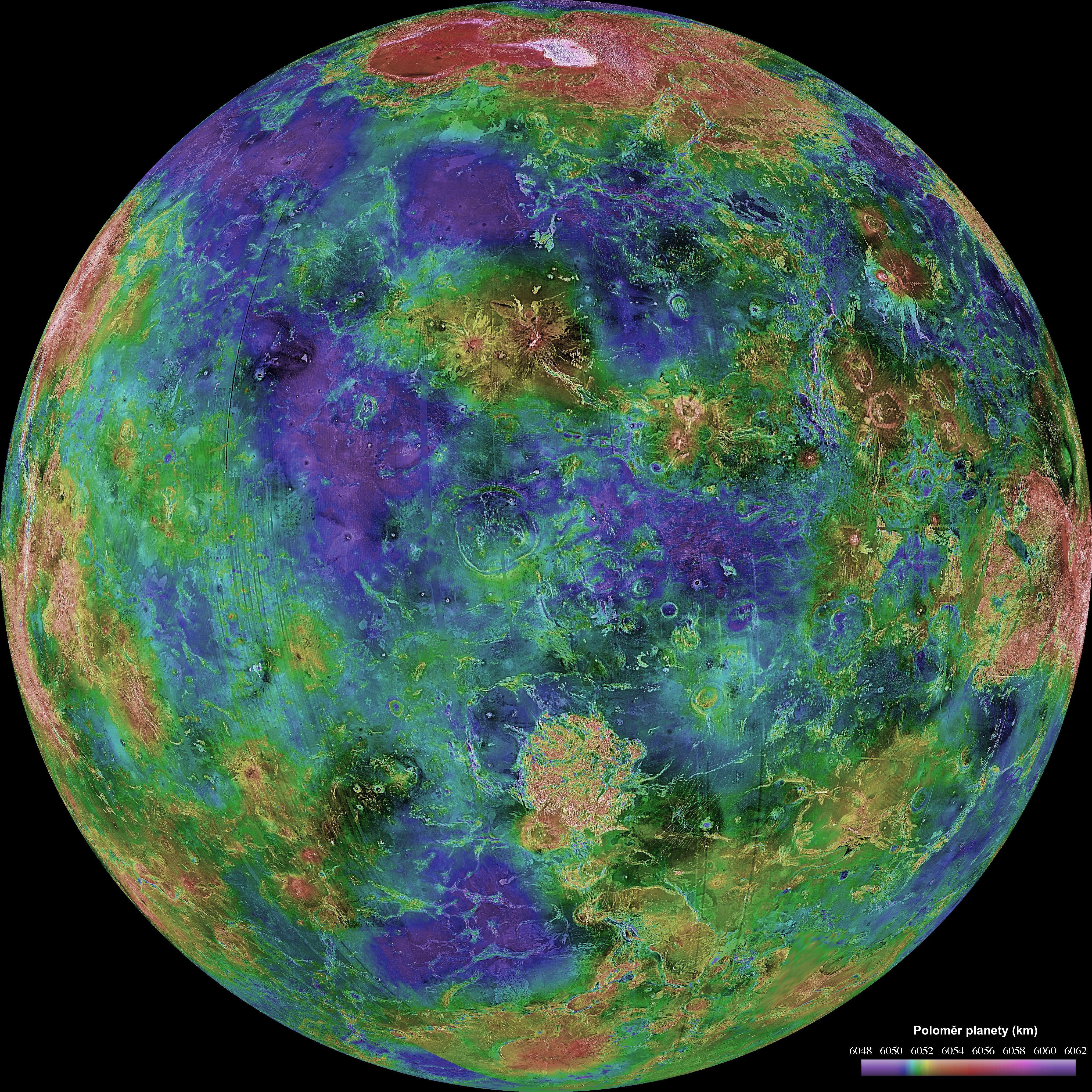 Radarový snímek povrchu Venuše v nepravých barvách vycentrovaný do bodu 0 s.š. a 0 v.d.